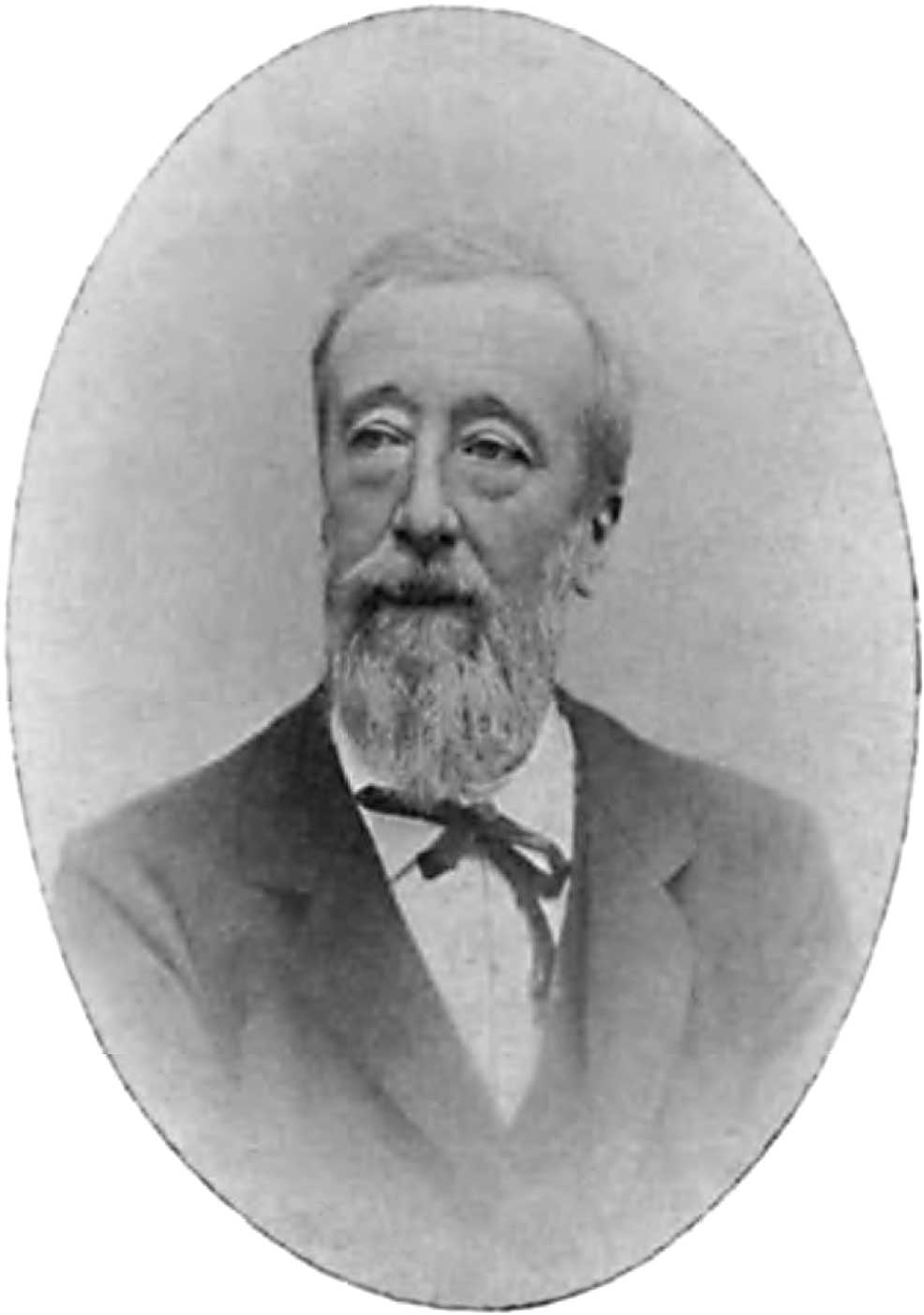 Eduard Mulder (1832-1924) war ein niederländischer Chemiker